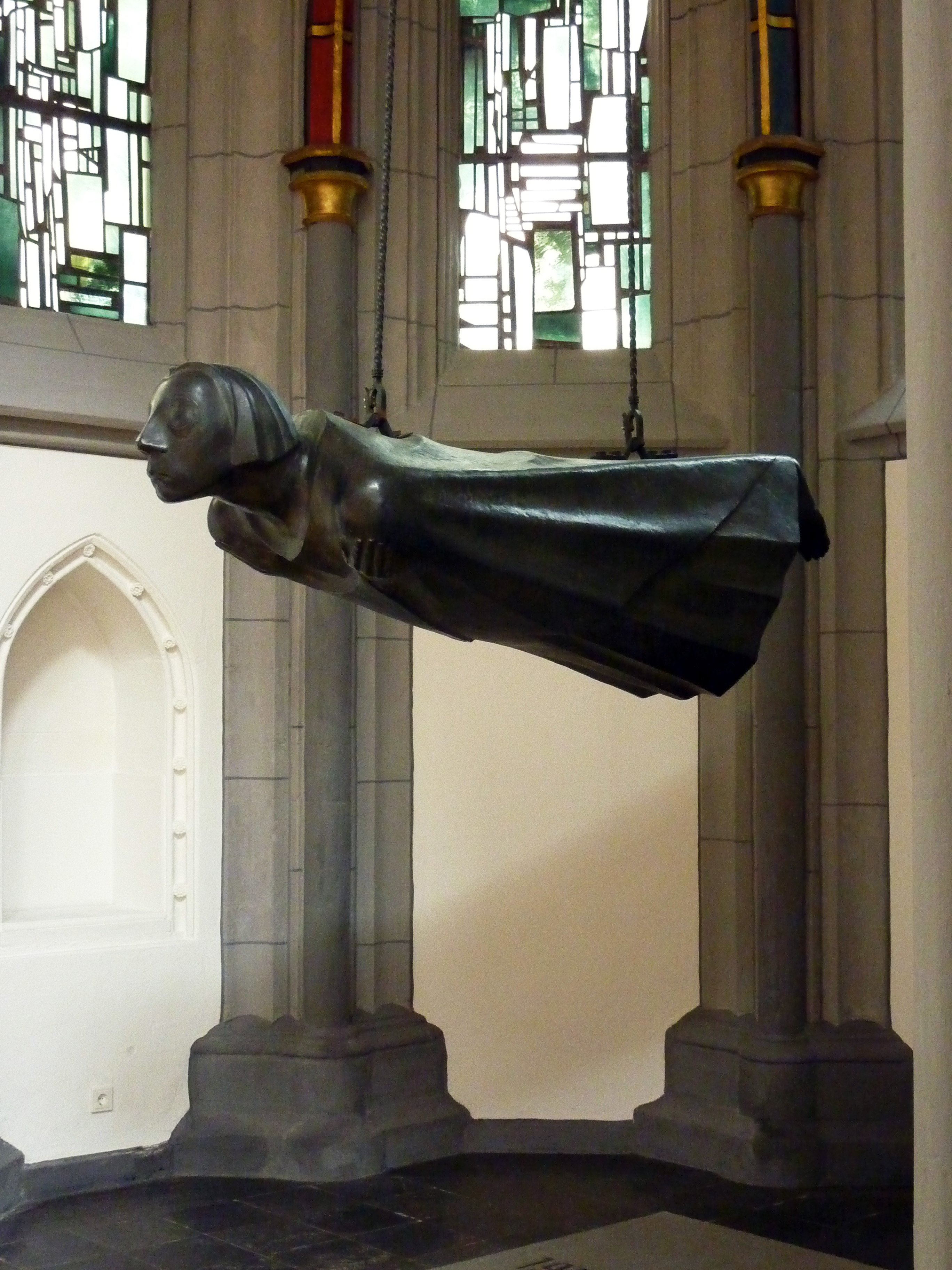 Der Schwebende, Antoniterkirche (Köln), Ernst Barlach-Nachguss/Zweitguss .